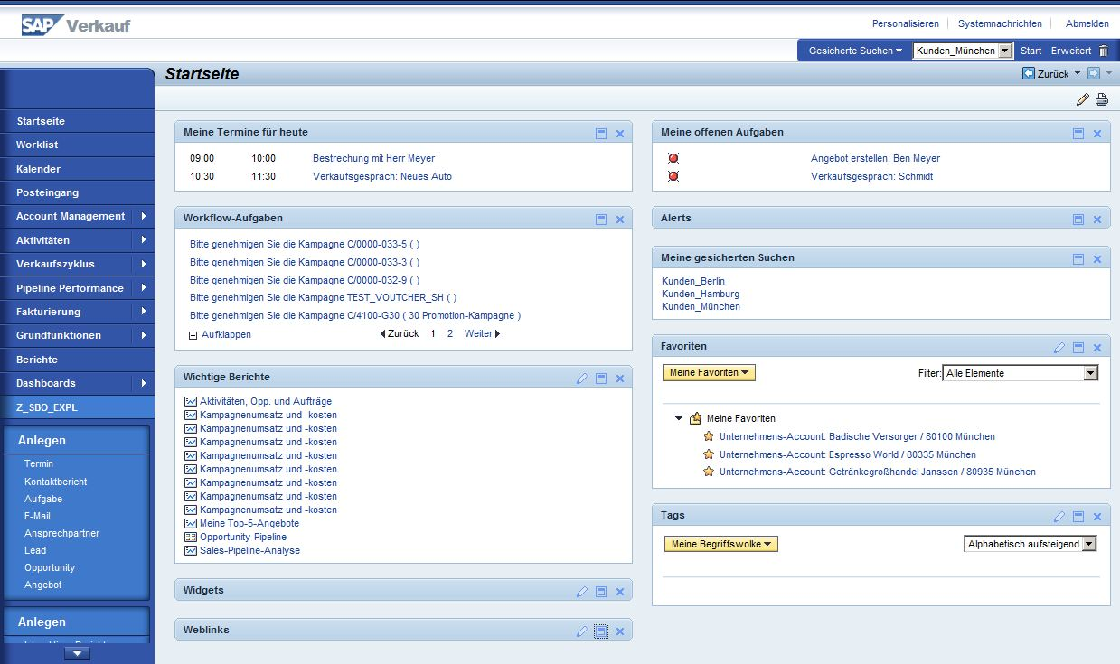 Screenshot von SAP Verkauf. CRM Startseite.